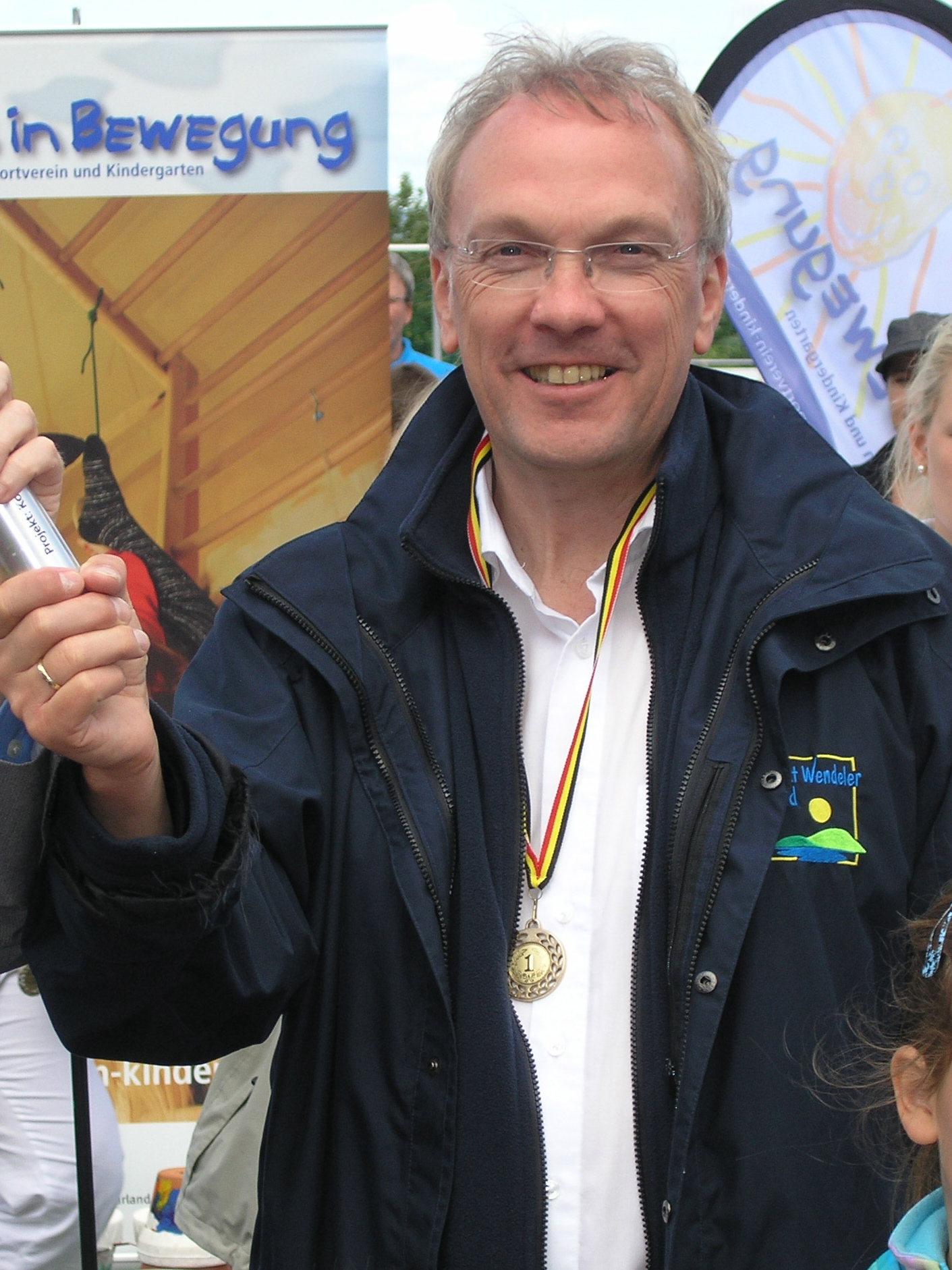 Der Landrat des Landkreises St. Wendel, Udo Recktenwald, bei der Veranstaltung "10 Jahre Kids in Bewegung" in Winterbach (Saar).